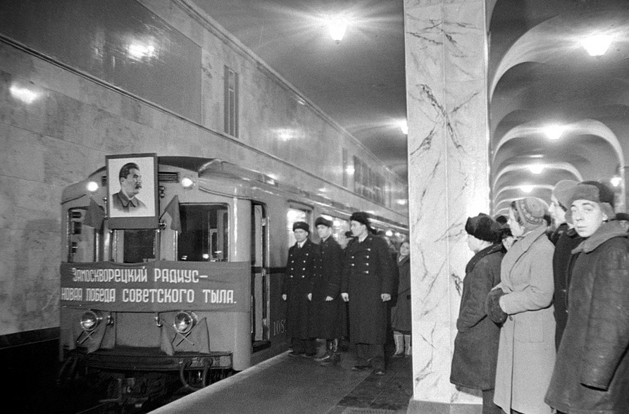 Первый поезд из вагонов типа Б на станции «Завод имени Сталина» (ныне «Автозаводская»)